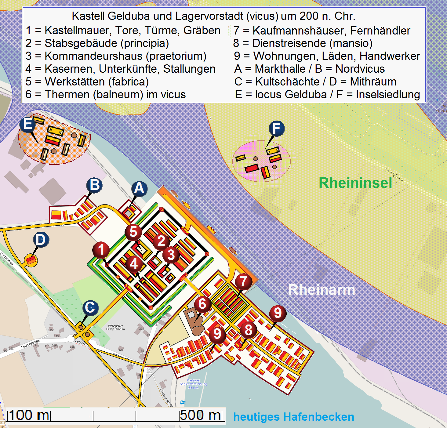 Gelduba Kastell um 200 n. Chr. This map of Krefeld-Gellep Gelduba Kastell um 200 n. Chr. was created from OpenStreetMap project data, collected by the community. This map may be incomplete, and may contain errors. Don't rely solely on it for navigation.